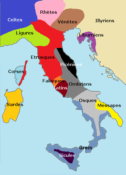 Les populations de la péninsule italienne et au delà